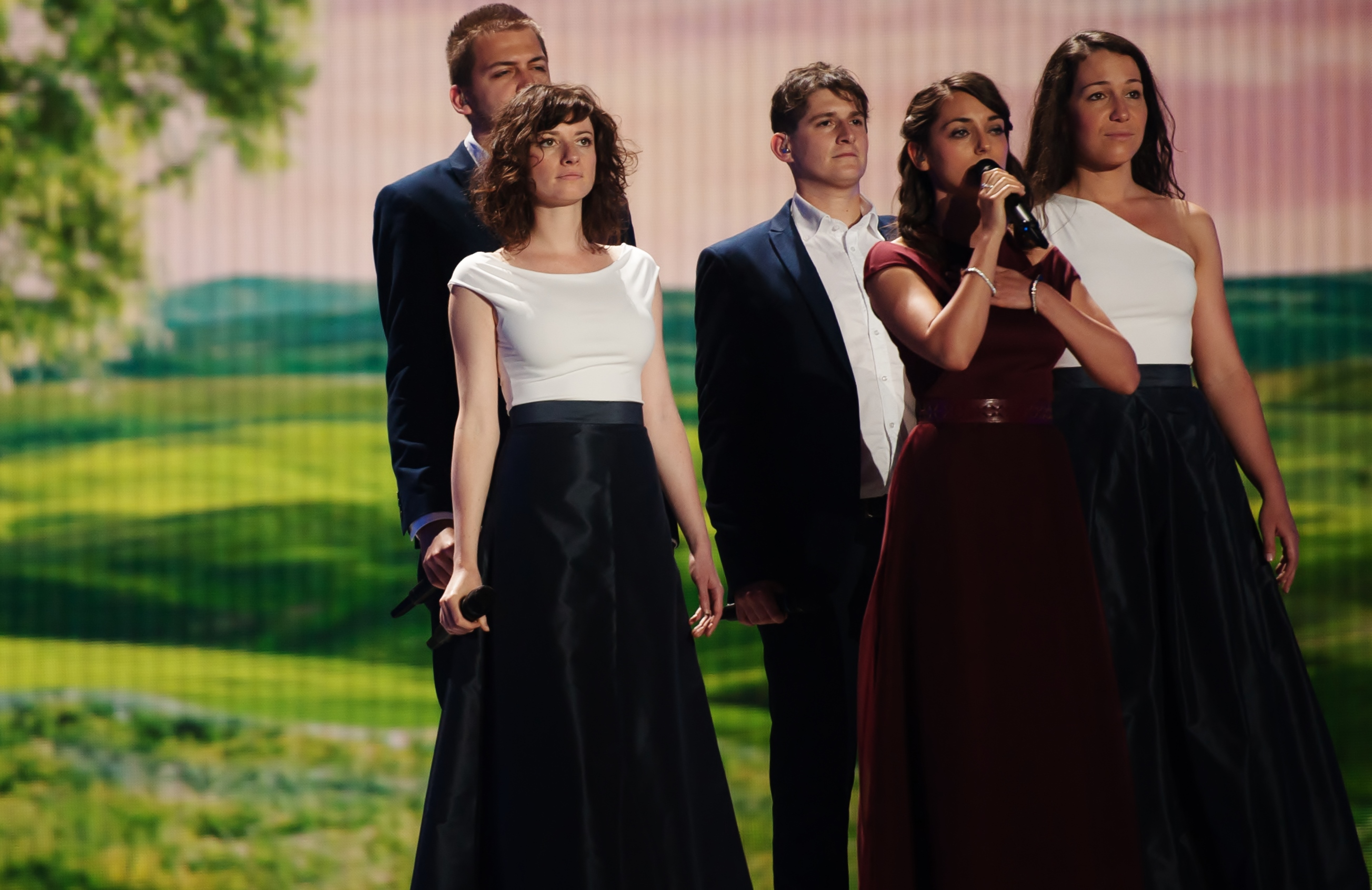 Boggie Eurovisiooni lauluvõistlusel